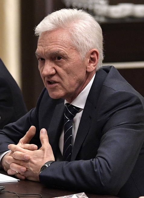 Сопредседатель Экономического совета ассоциации «Франко-российская торгово-промышленная палата», владелец частной инвестиционной группы «Волга Груп» Геннадий Тимченко во время встречи с Президентом России Владимиром Путиным